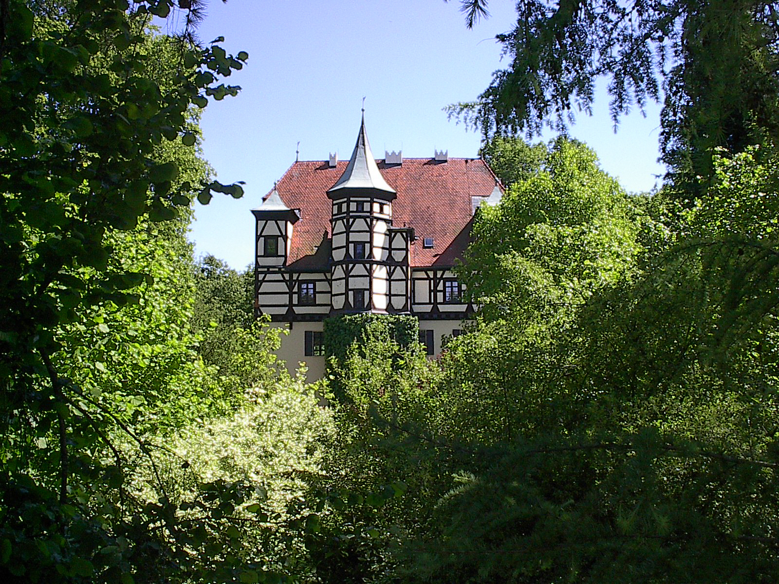 Tucherschloss "Altes Schloss" in Simmelsdorf, bis heute im Besitz der Tucher von Simmelsdorf, Am Tucherschloß 1